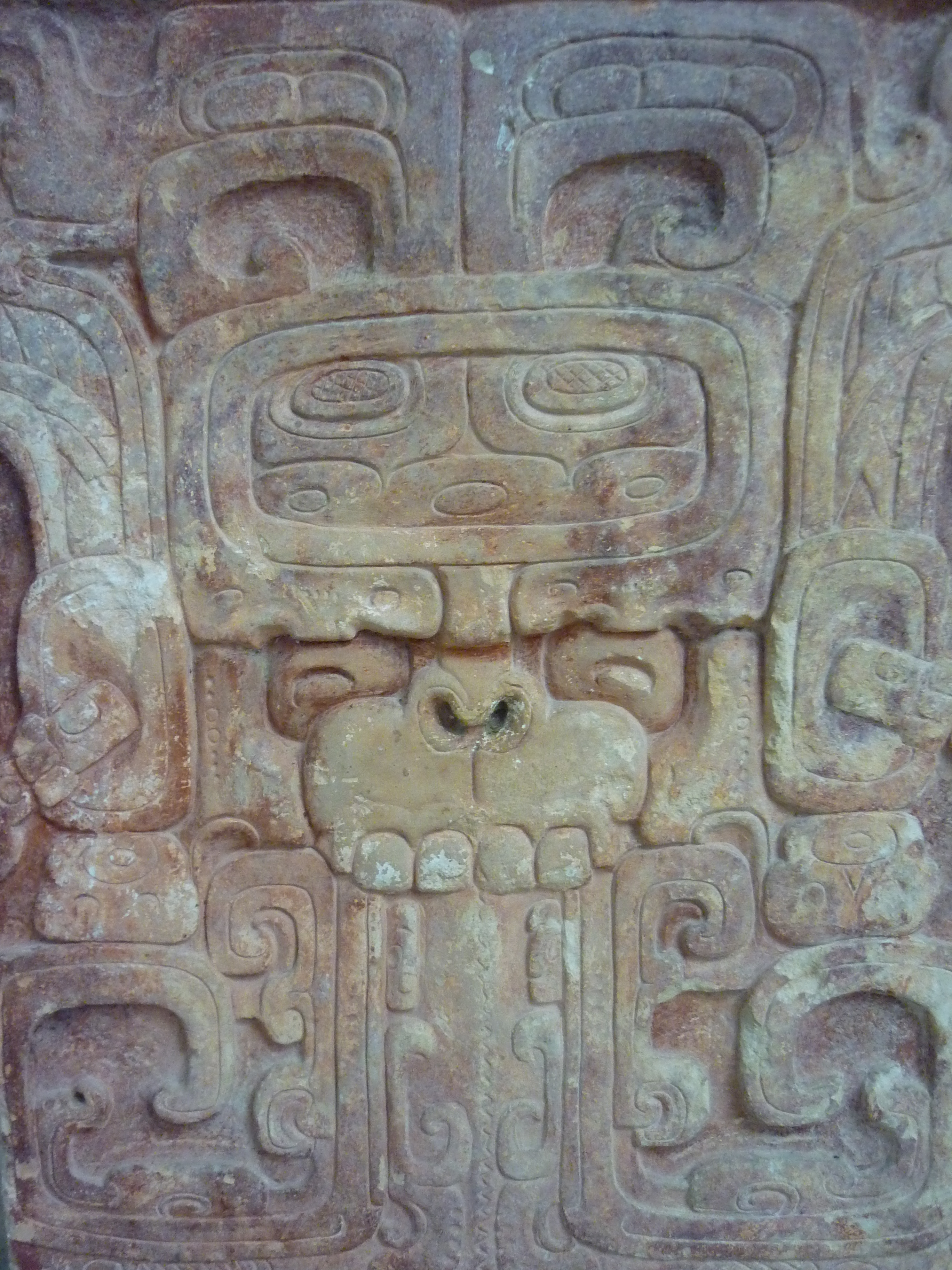 Tablero localizado sobre las escalinatas del Edificio 4 de la ciudad maya de Pomoná. En él se aprecia la figura antropomorfa de una deidad solar con rostro descarnado y lengua bífida su division en forma de zic-zac representa 2 dualidades. En la parte superior de la cabeza (frente) se encuentra un grifo que representa una fecha en el calendario maya. Pieza del museo de Sitio de Pomoná, Tenosique